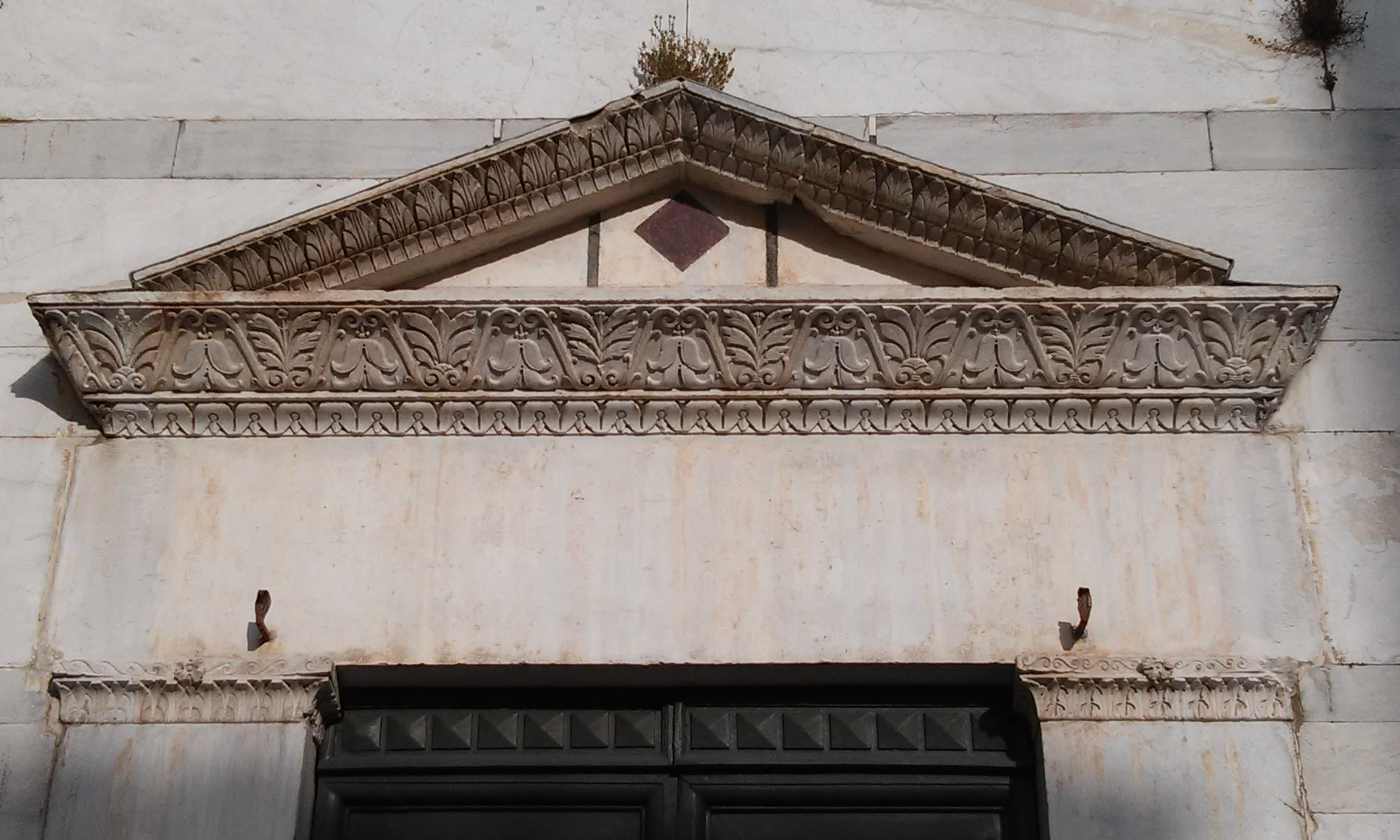 Sant'Alessandro. Lucca. Frontone del portale